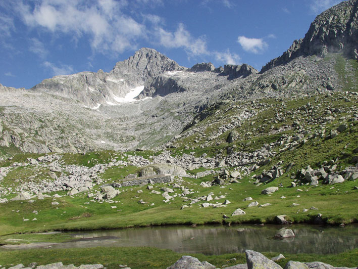 Cima Carè Alto dalla Casina Dosson in Val di San Valentino Autore Piergiorgio Motter Uso libero